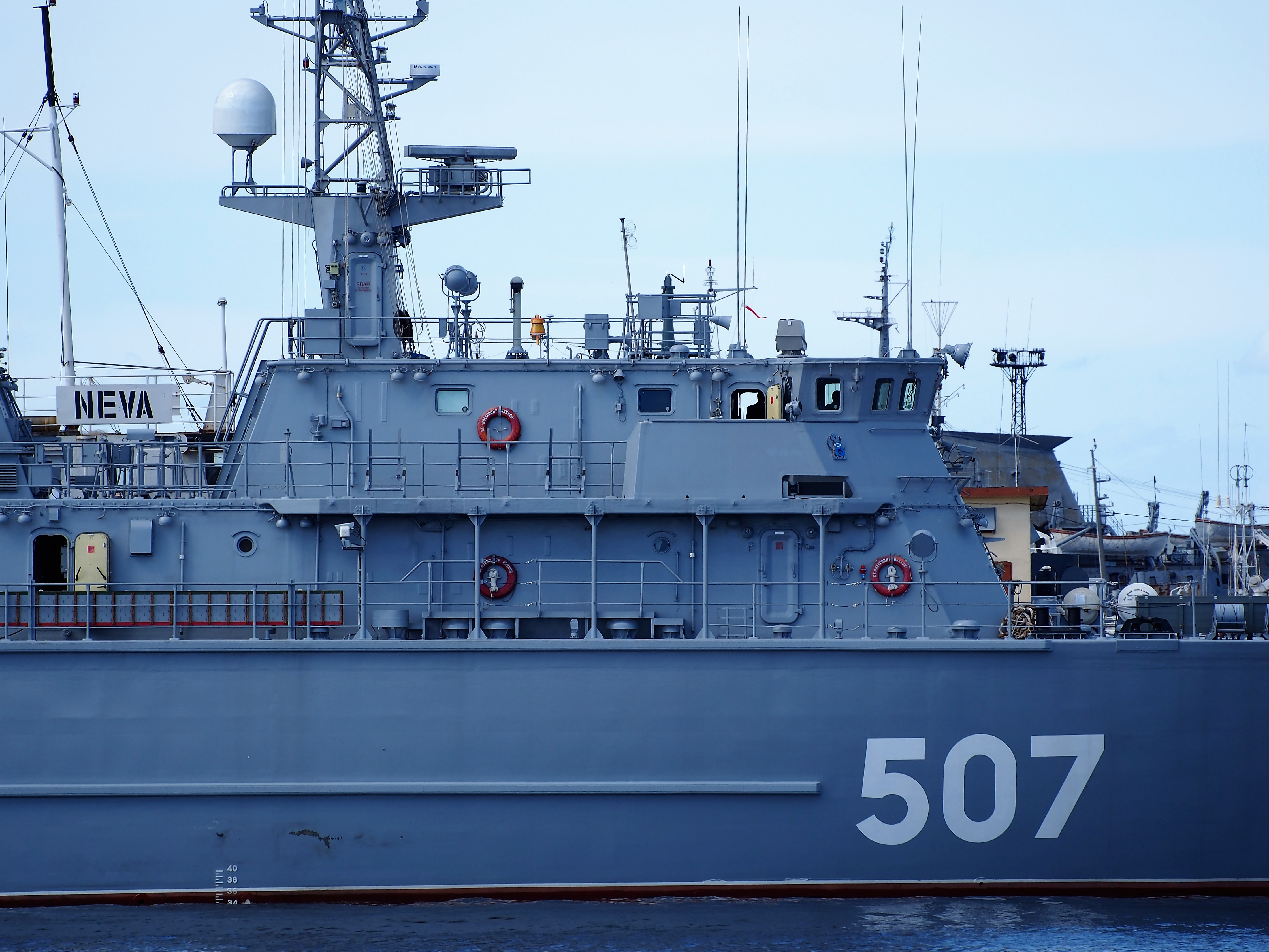 Port of Kronstadt.